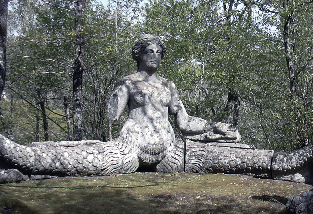 Sculpture d'Echidna, la mère de tous les monstres, dans les jardins de Bomarzo.